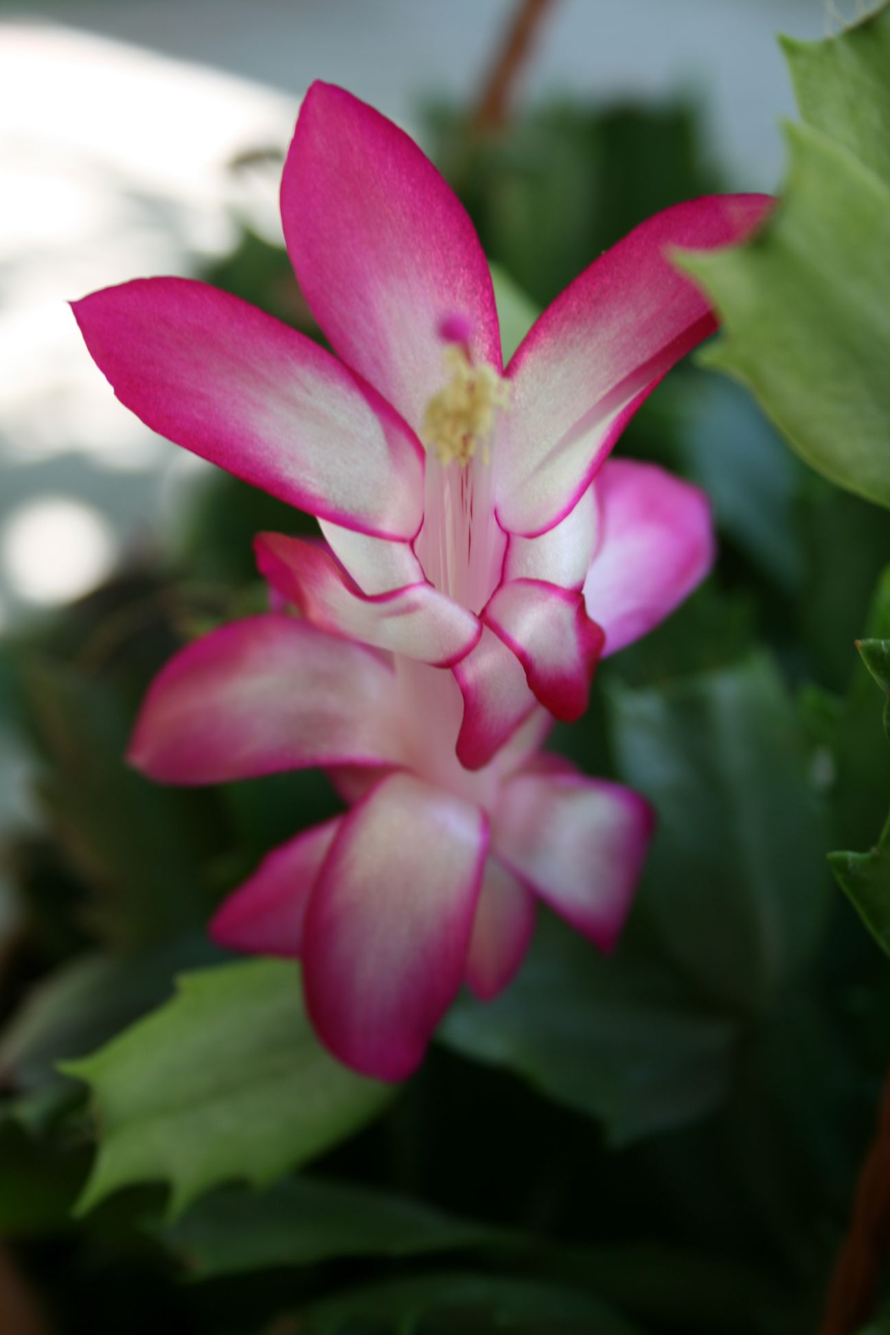 Schlumbergera truncata (Rhipsalideae; Cactaceae; Planta) kaktusz 'Dark Eva' változatának virága